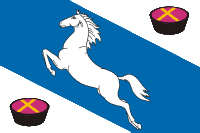 Флаг Белореченска, Краснодарский край, Россия.